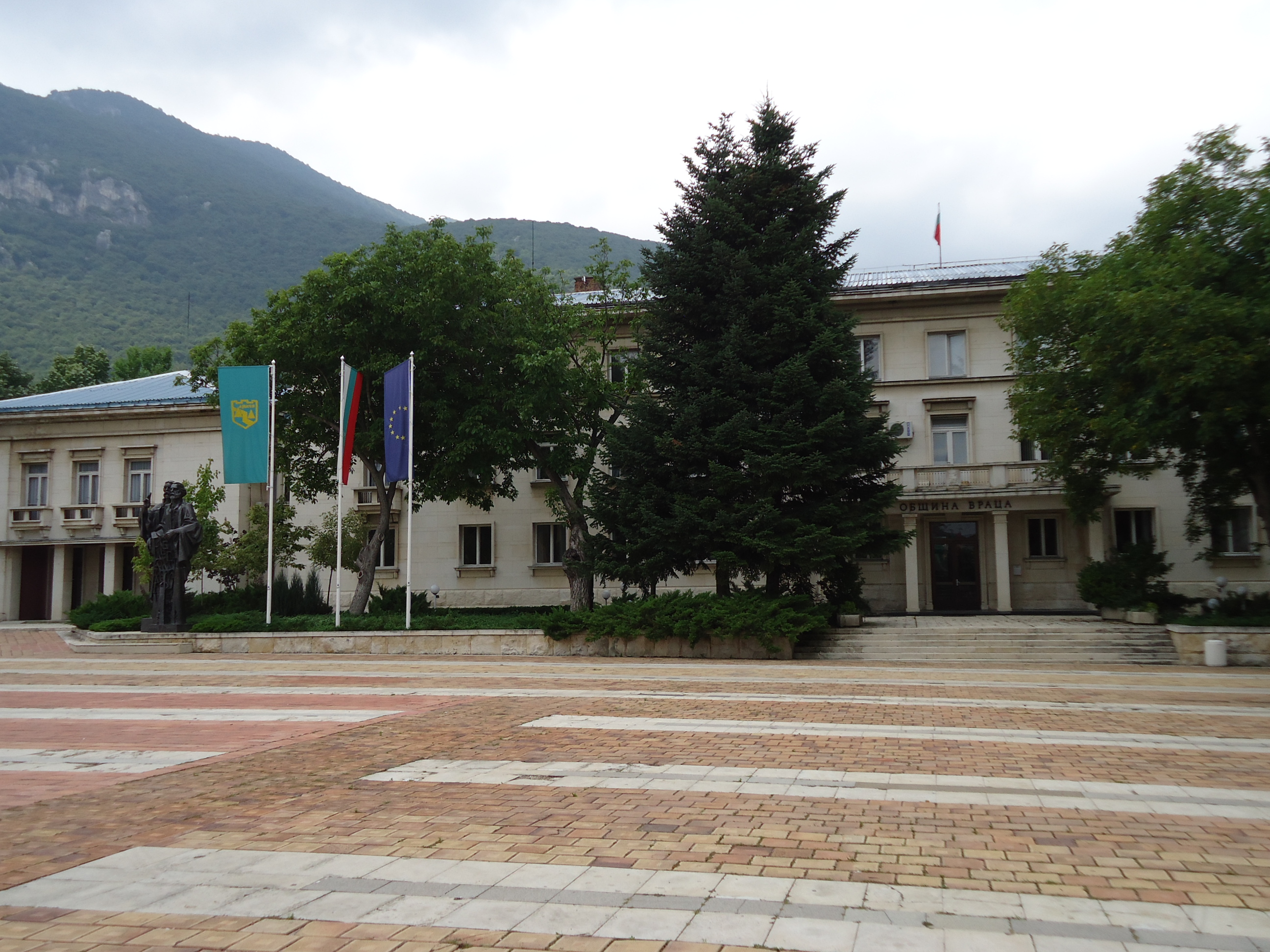 Община Враца